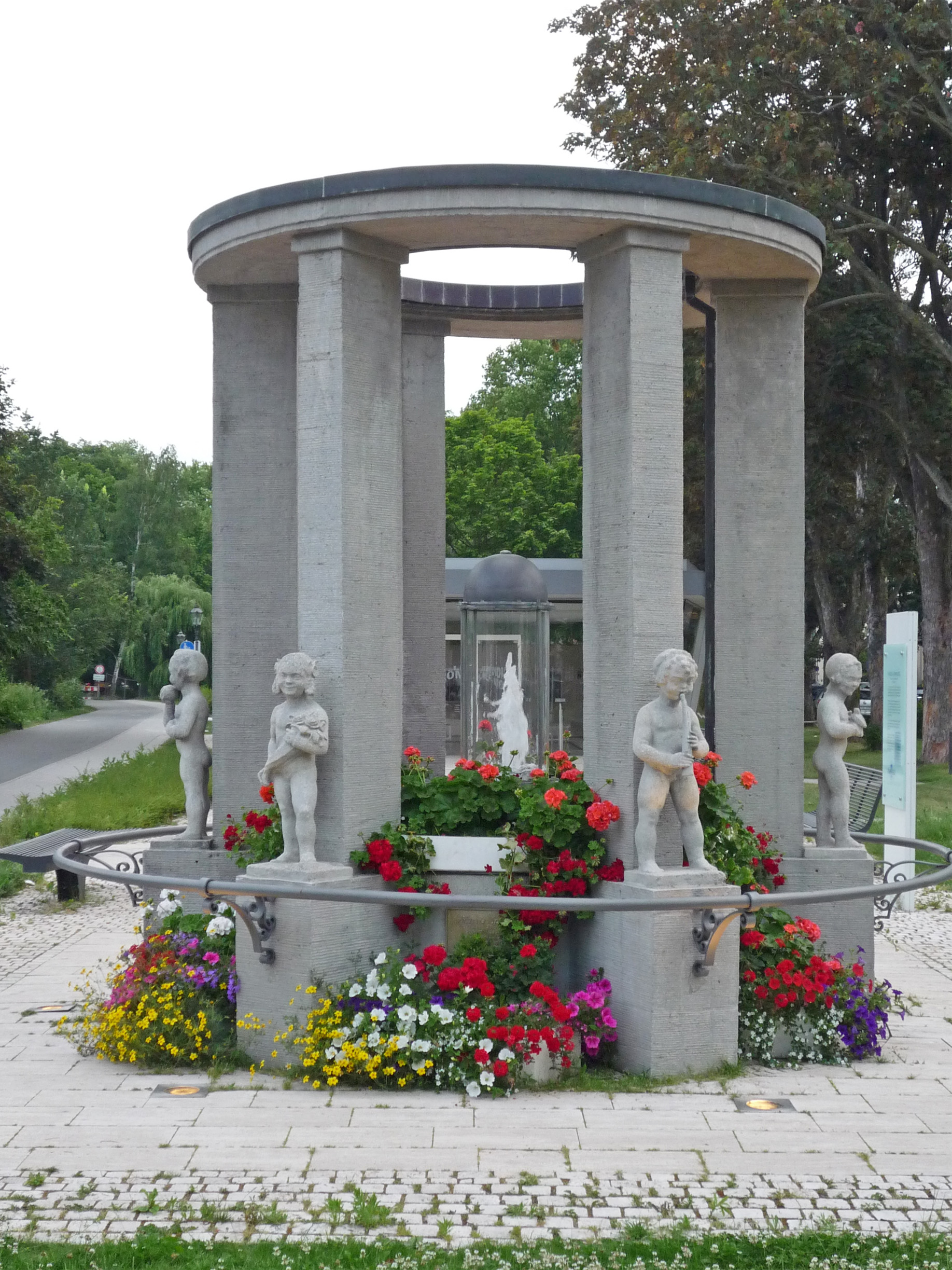 Hassia-Quelle in Bad Vilbel - 1936 im Vilbeler Kurpark erbohrt. Die vorstehenden Putten sollen die heilende Wirkung des Mineralwassers symbolisieren.